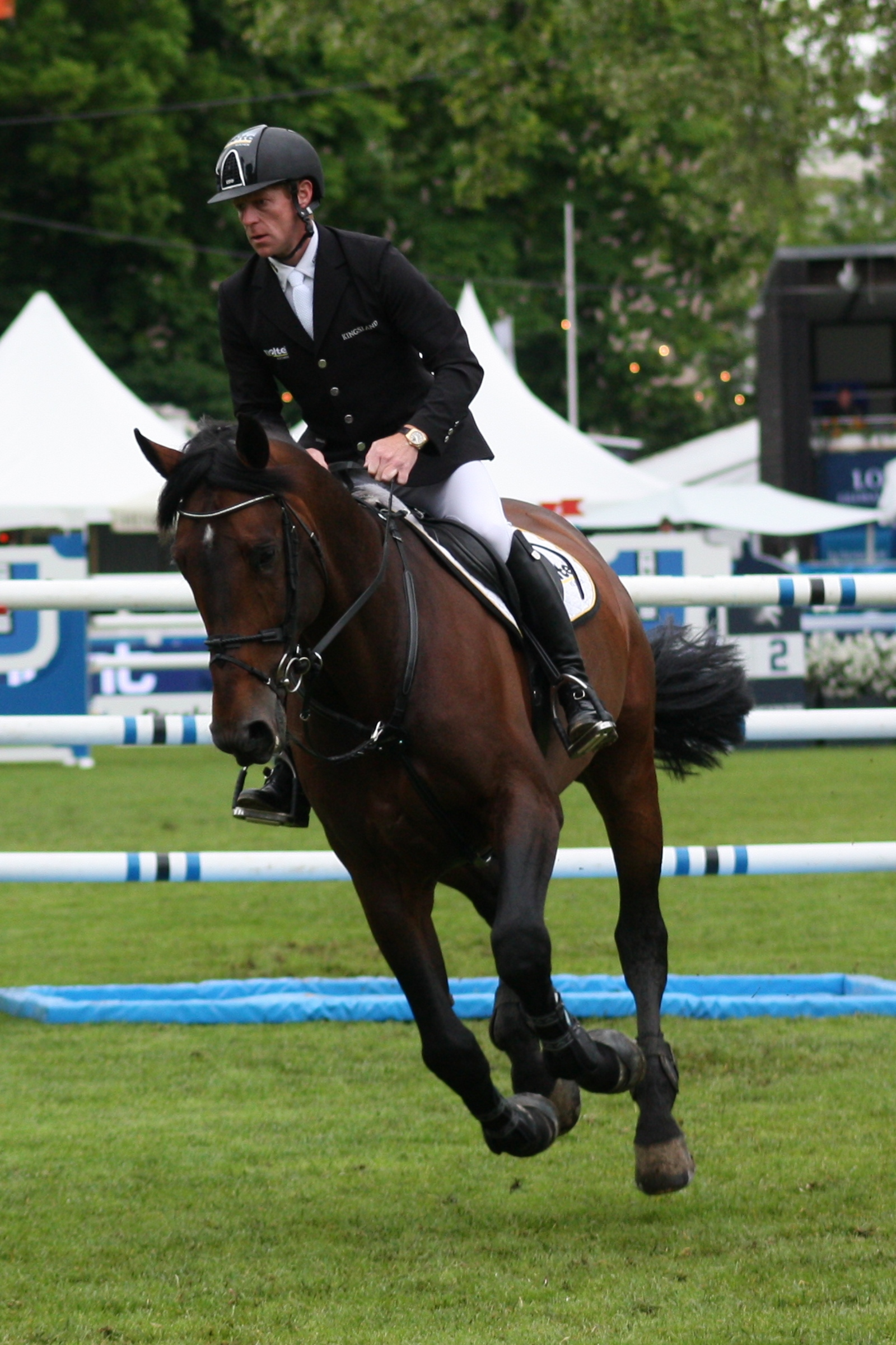 77. Internationanles Wiesbadener Pfingstunier 2013, CSI***** Eröffnungsspringen, Marcus Ehning auf Copin van de Broy Personality rights warning Although this work is freely licensed or in the public domain, the person(s) shown may have rights that legally restrict certain re-uses unless those depicted consent to such uses. In these cases, a model release or other evidence of consent could protect you from infringement claims.